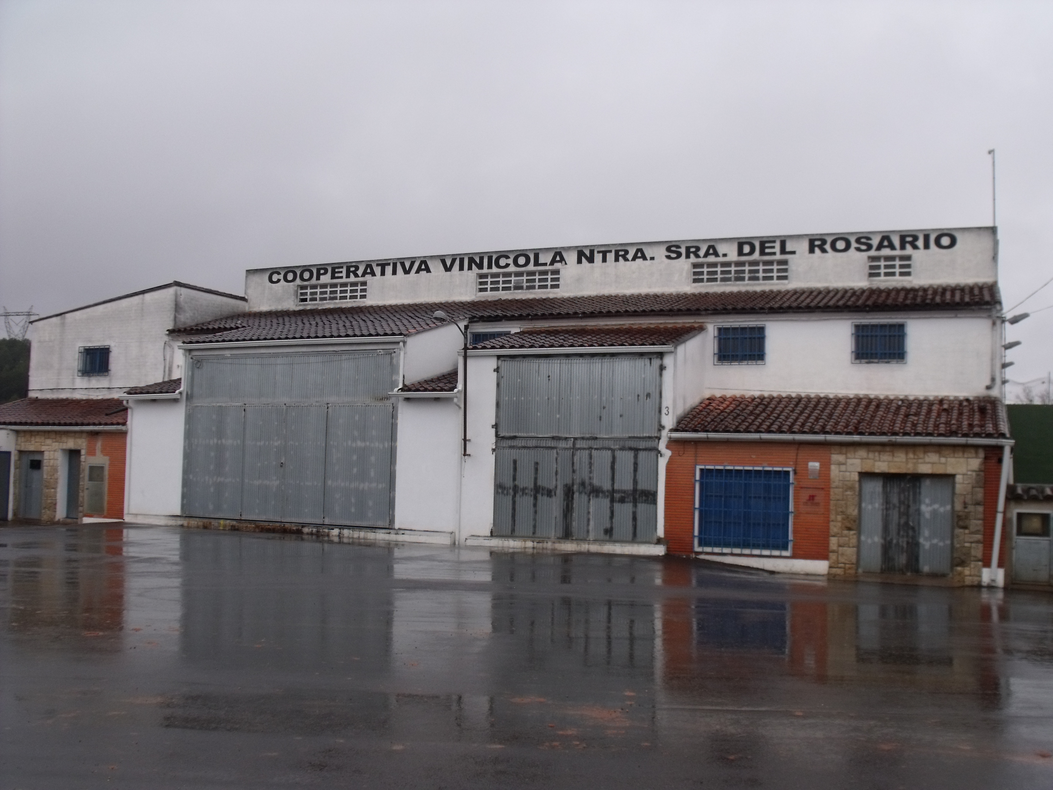 Vistas de la cooperativa